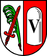 Gemeinde Pfarrwerfen: In gespaltenem Schild rechts in Silber ein schräglinkes aufrechtes rotes Schwert, darunter gekreuzt mit einem grünen Palmenzweig. Links in Rot ein silberner römischer Meilenstein, belegt mit dem schwarzen Buchstaben "V"